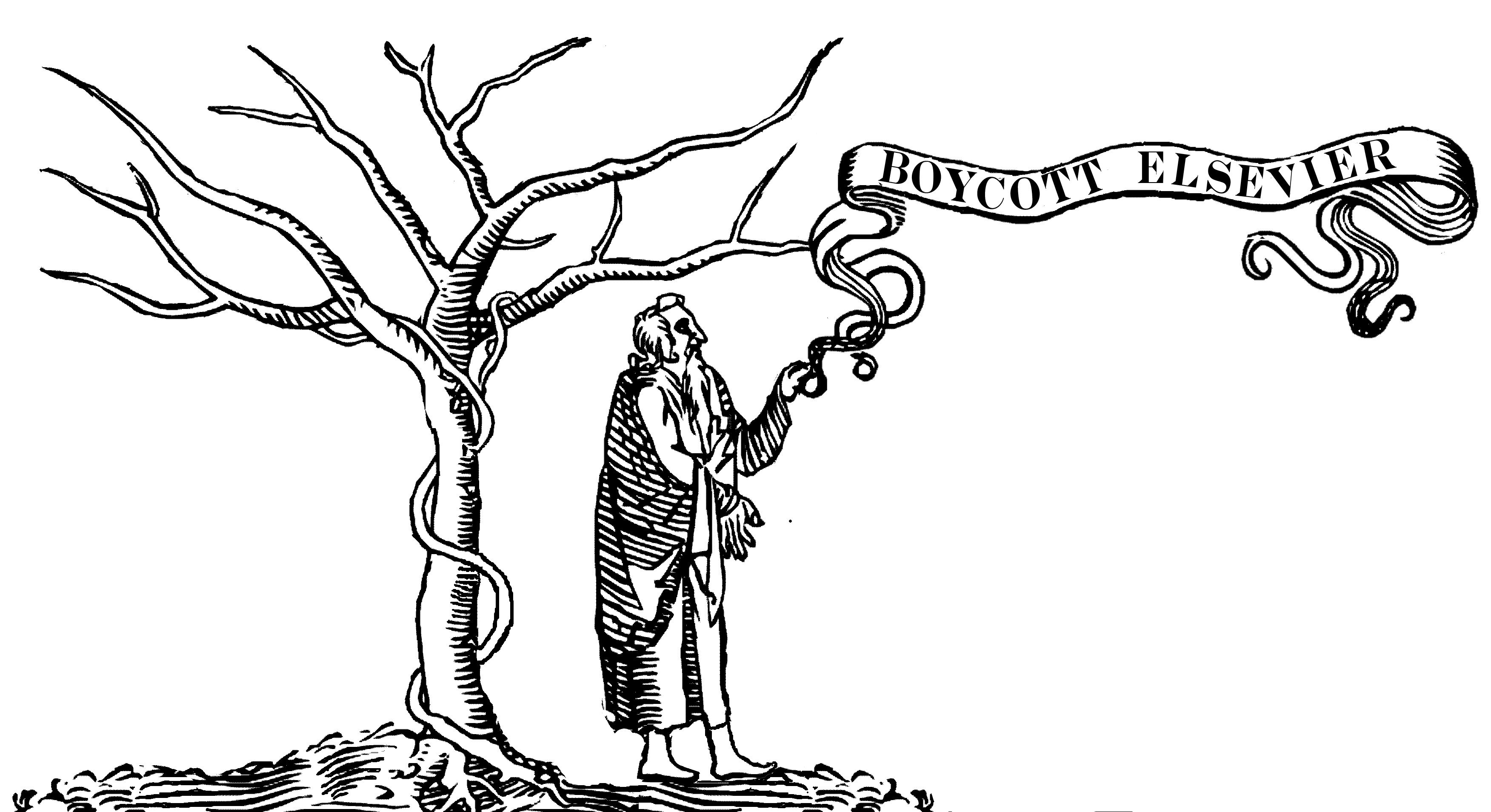 image inspired by Elsevier’s old printers mark